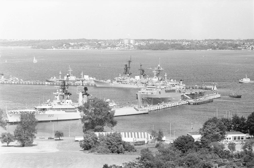 Im Vordergrund links Zerstörer FIFE (D 20, brit.) und in der Bildmitte Landungsmutterschiff TRENTON (LPD-14, amerik.), dahinter Zerstörer LÜTJENS (D 185) und Versorgungsschiff OFFENBURG (A 1417).